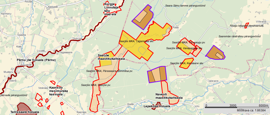 Saarjõe MKA ja Navesti MKA Maa-ameti kaardil.